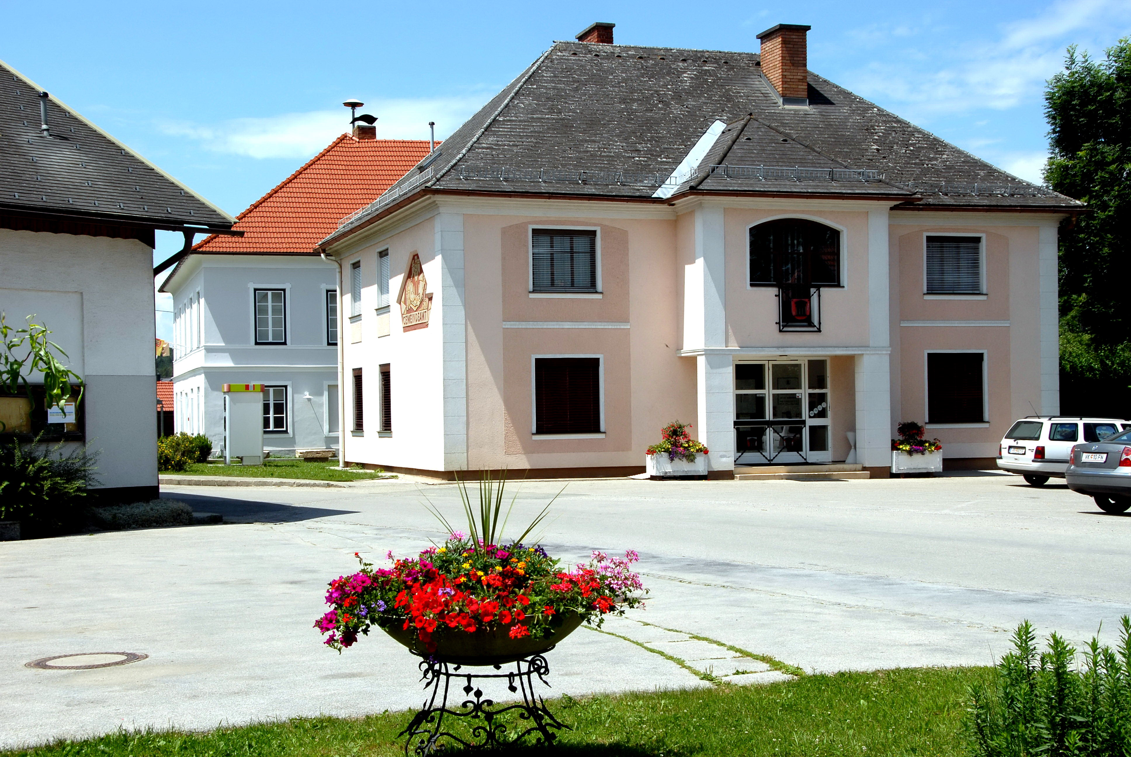 Municipal hall at Globasnitz, Carinthia, Austria